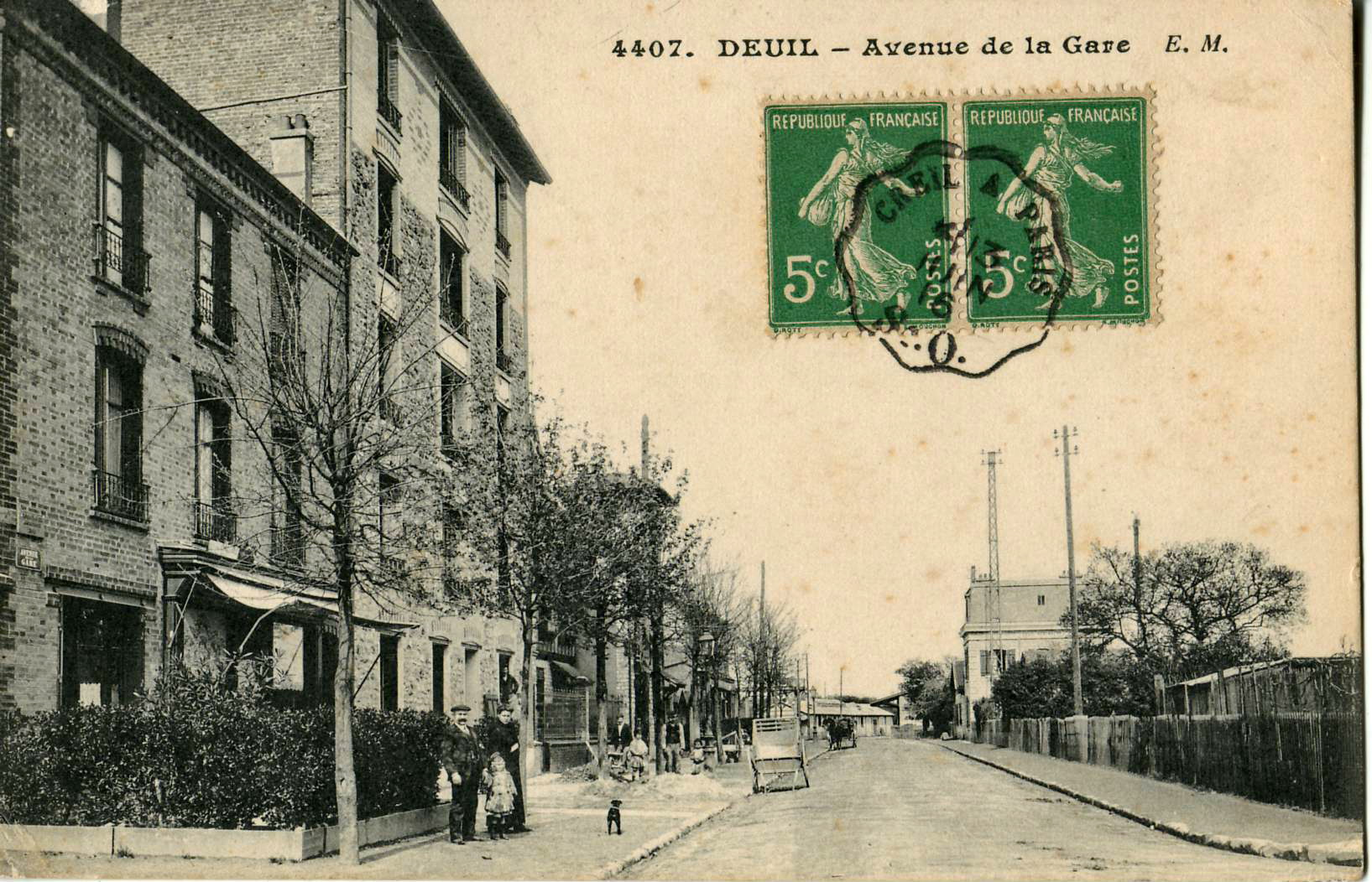 Carte postale ancienne éditée par EM, n°4407 :DEUIL-LA-BARRE - Avenue de la GareTimbre oblitérée par un cachet d'ambulant postal, ligne Creil à Paris